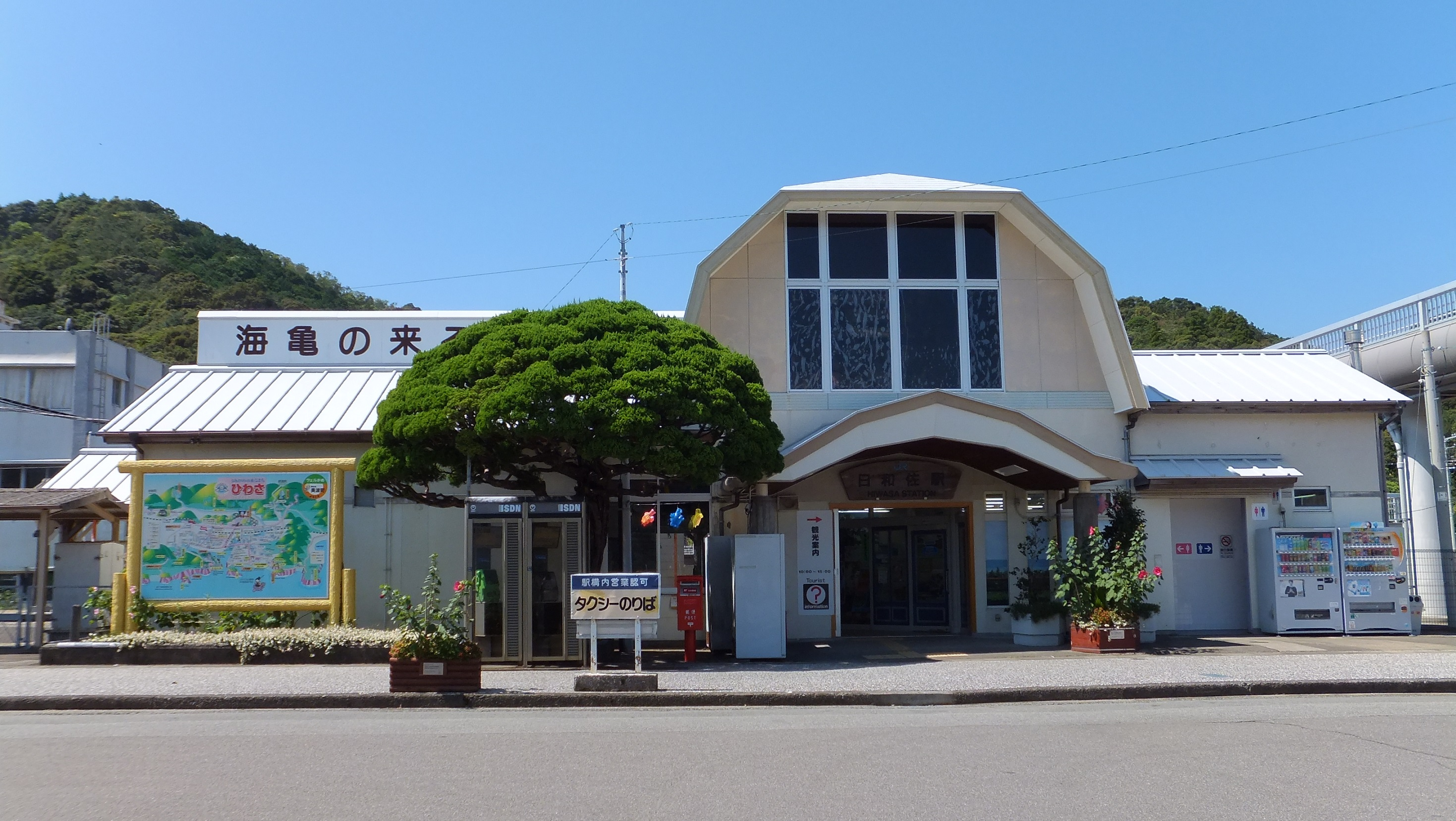 JR四国 牟岐線 日和佐駅 （徳島県海部郡美波町 2015年9月）